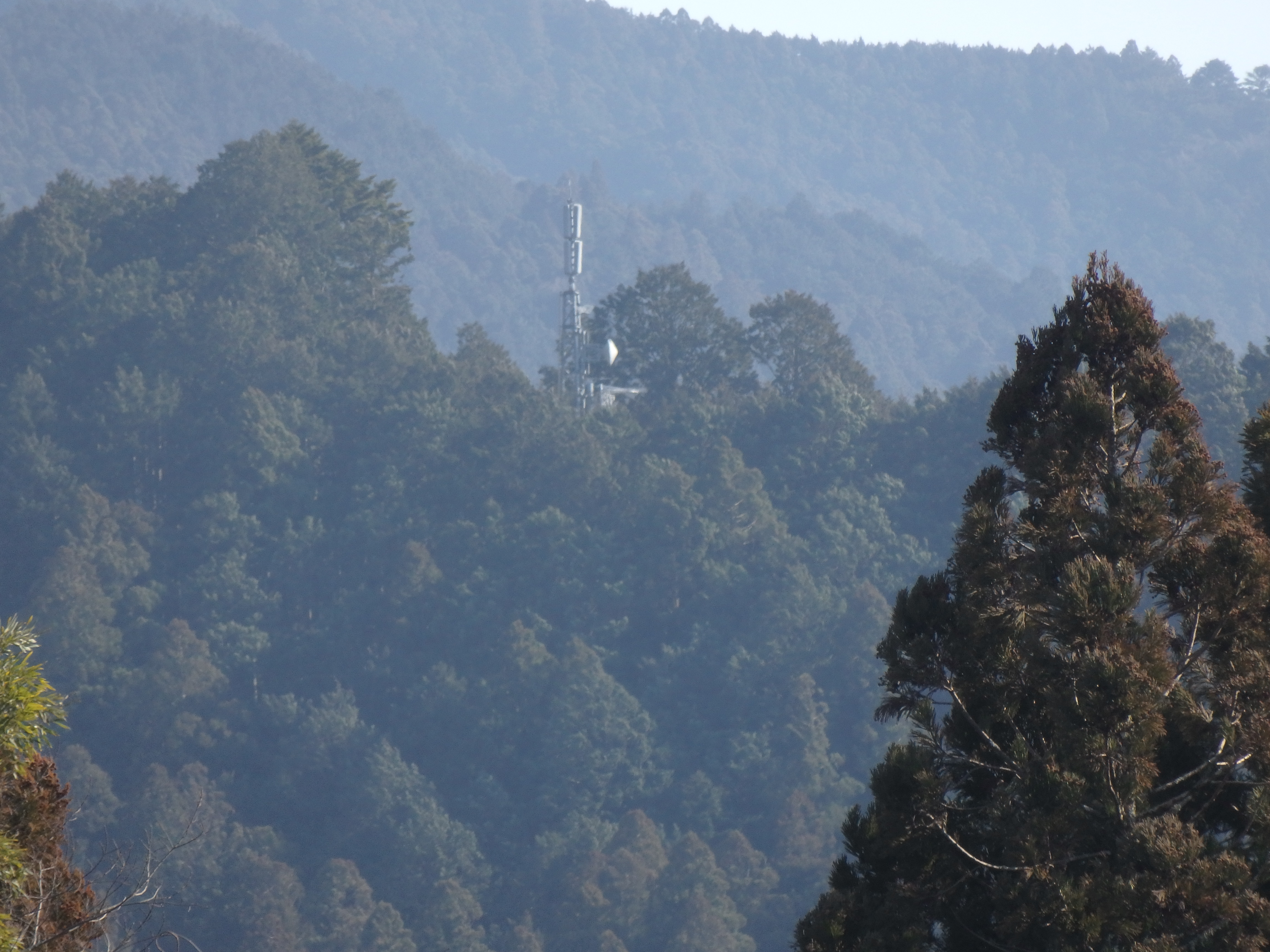 愛知県新城市にある鳳来大野テレビ中継局。三河大野駅プラットホームより撮影。